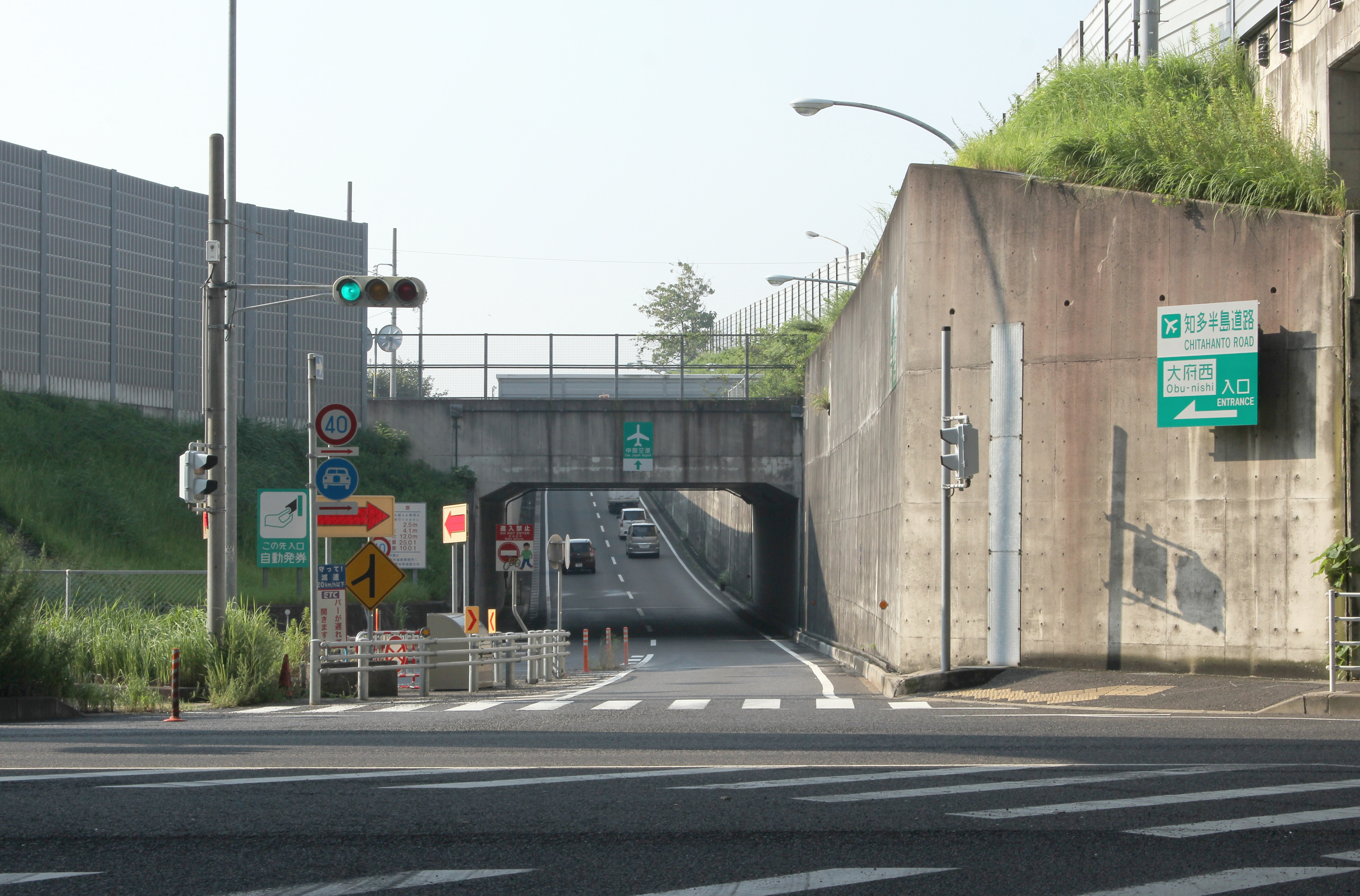 知多半島道路 大府西IC入口